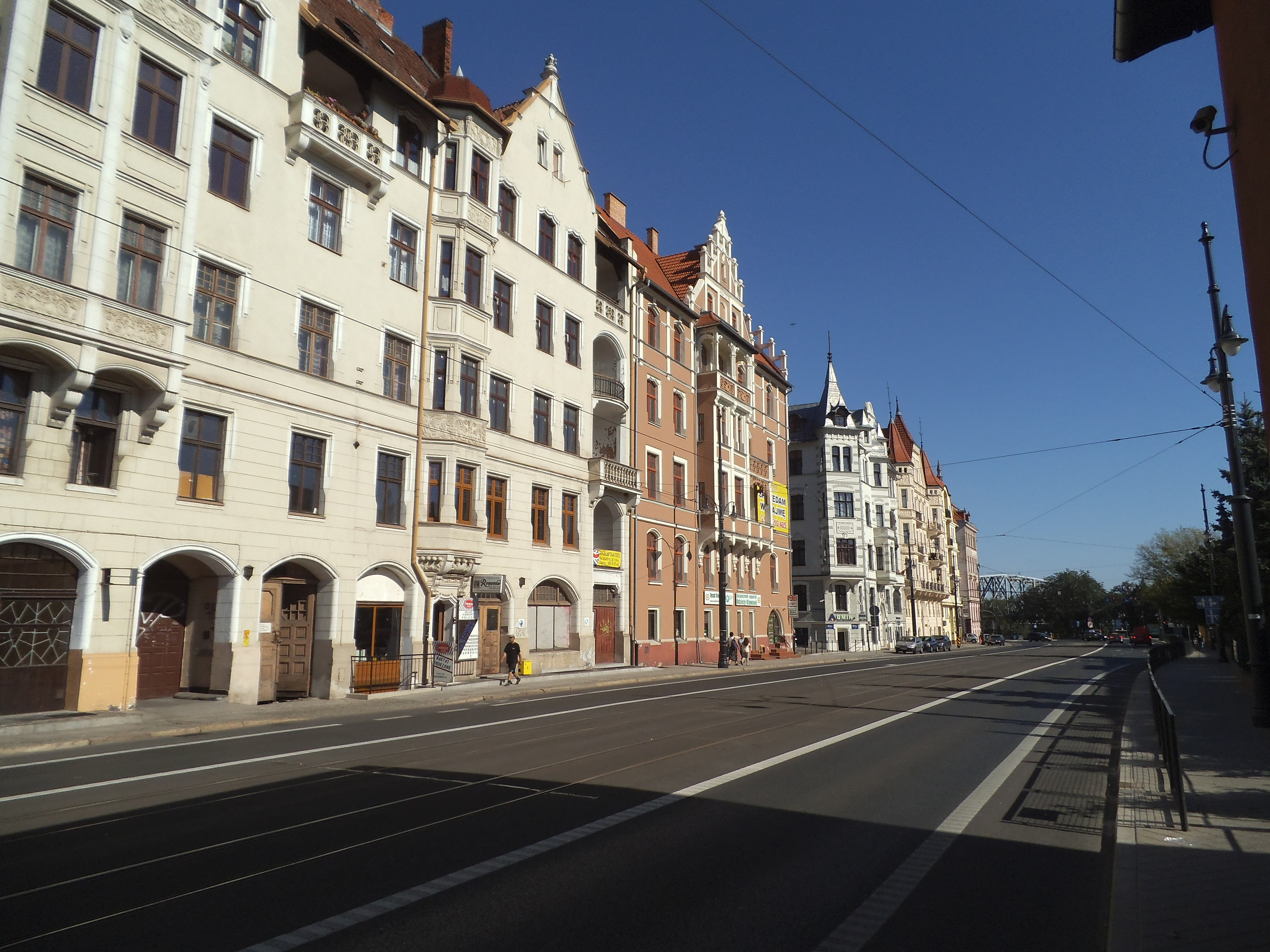 Ul. Warszawska w Toruniu